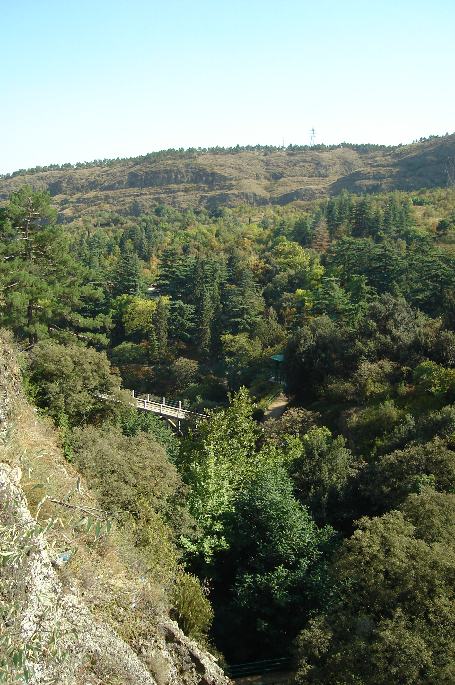 Tbilisi Botanical Garden